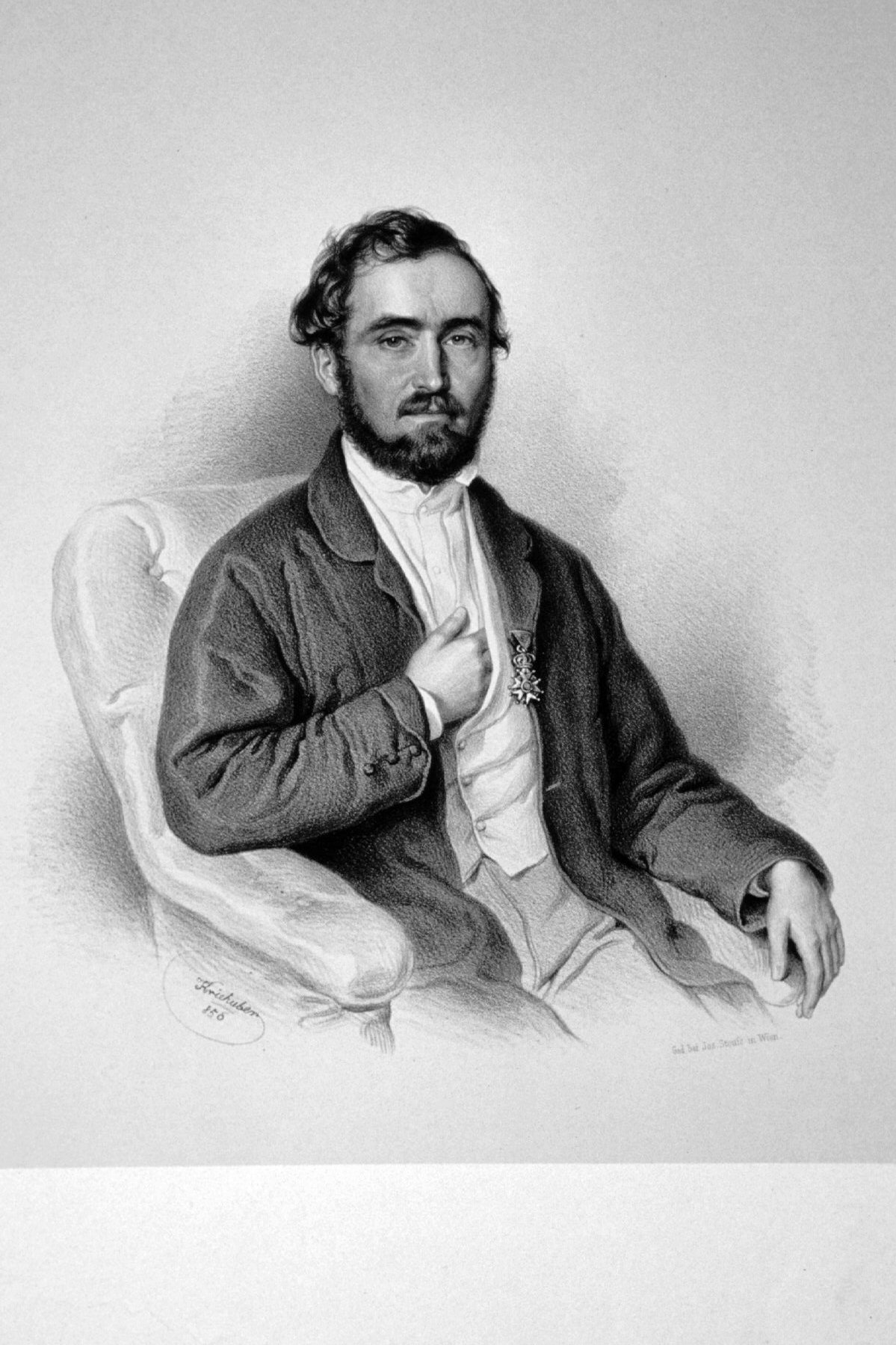 Leon Fürst Sapieha (1803-1878), Landmarschall von Galizien, erblicher Reichsrat von Österreich. Lithographie von Josef Kriehuber, 1856